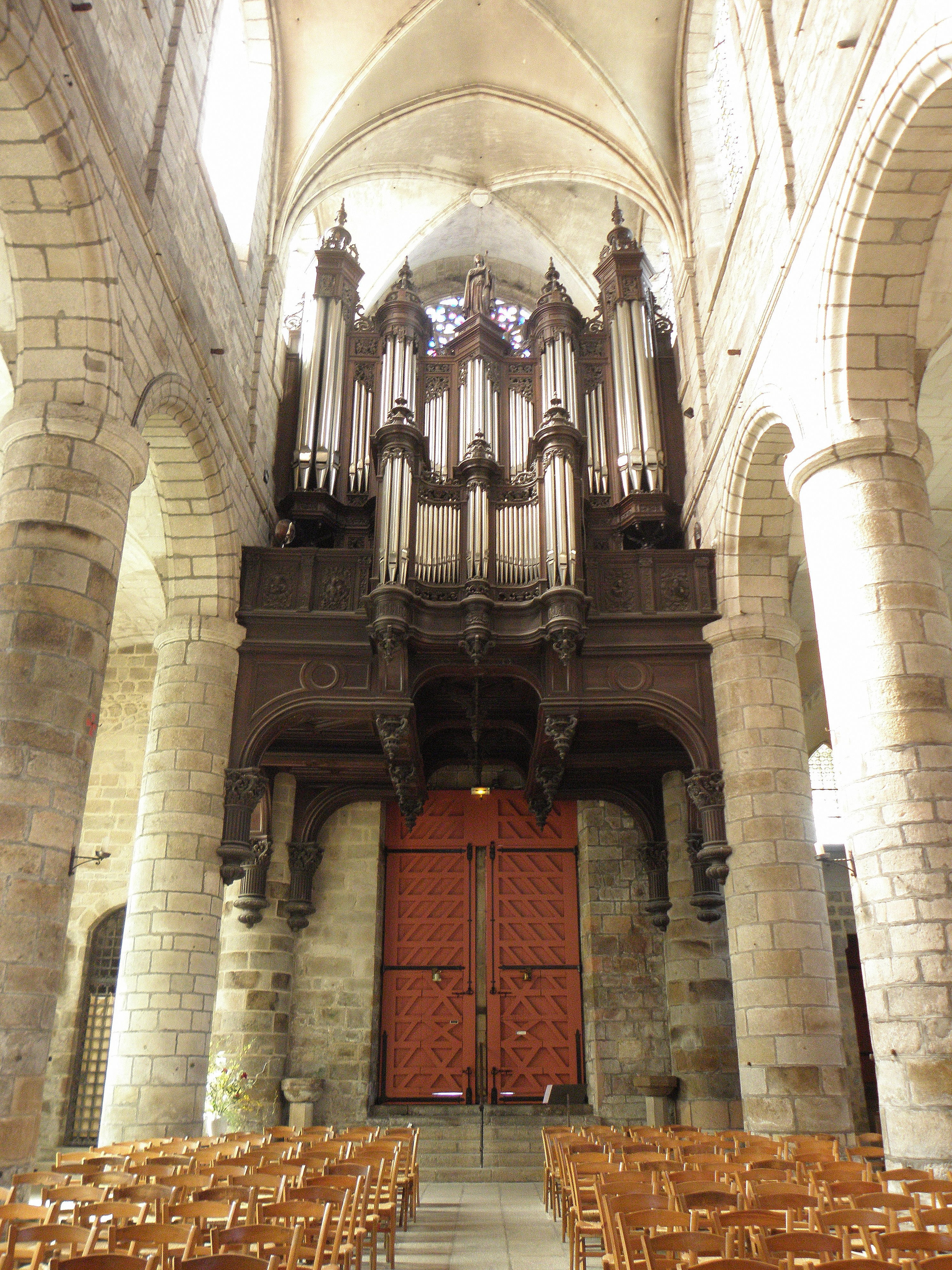 Grandes-Orgues Cavaillé-Coll de la cathédrale Saint-Étienne de Saint-Brieuc (22).